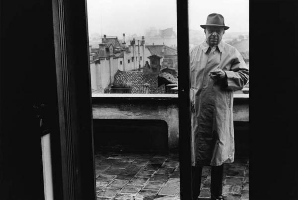 Milano. Eugenio Montale. Ritratto.